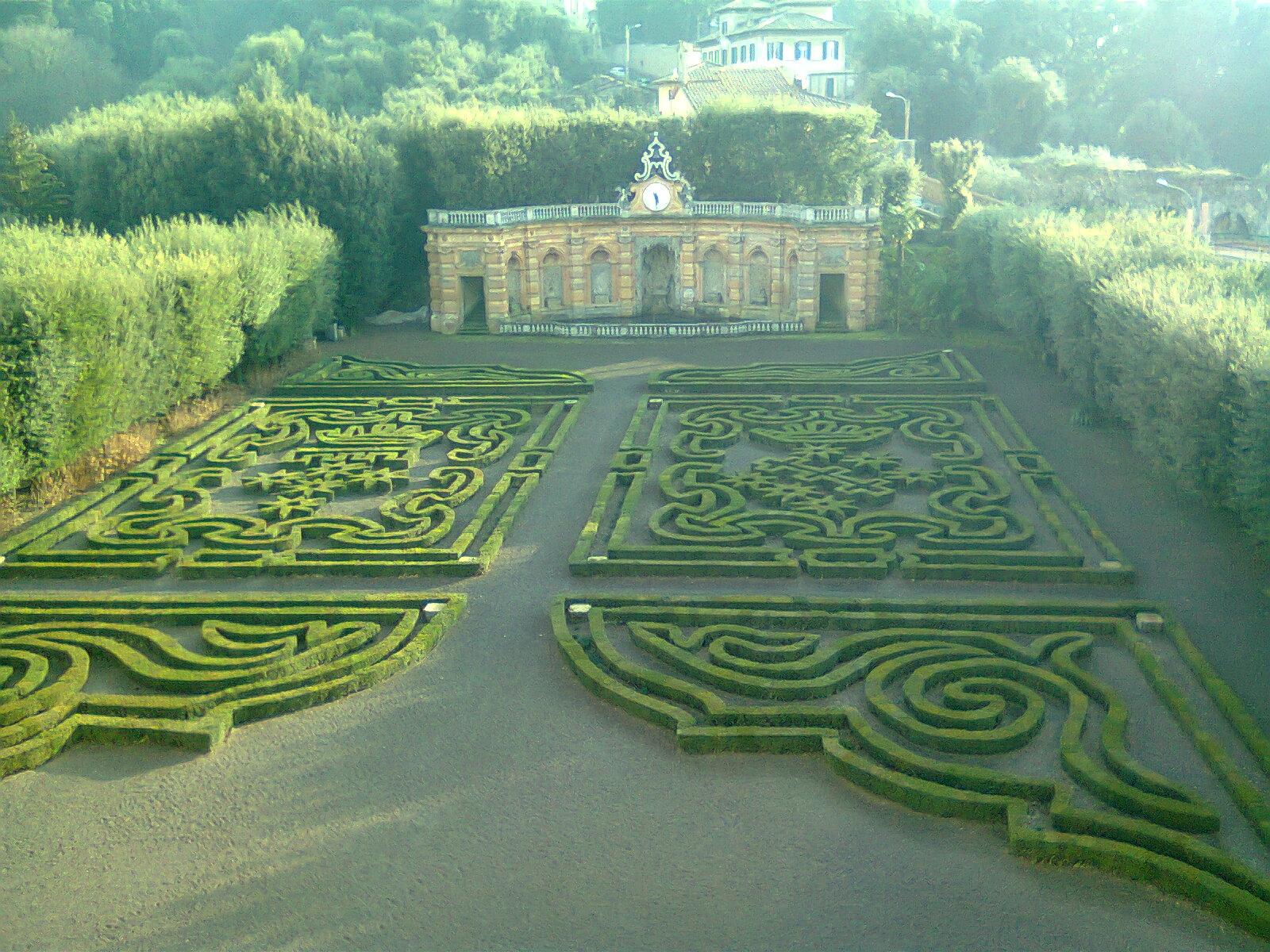 Giardino e Ninfeo di Villa Lancellotti a Frascati